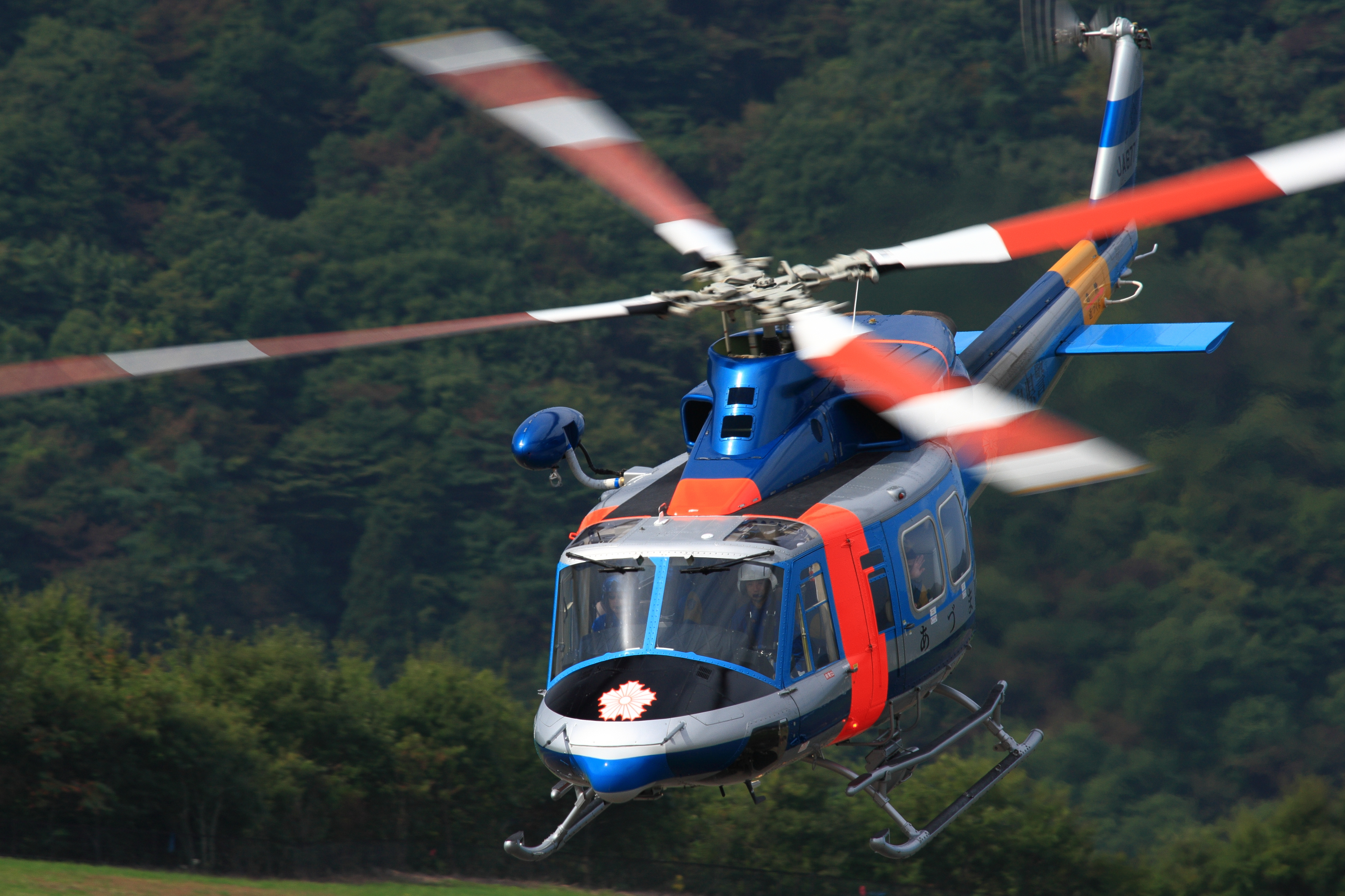 ふくしまスカイパークで撮影された、福島県警察航空隊のBell-412EP